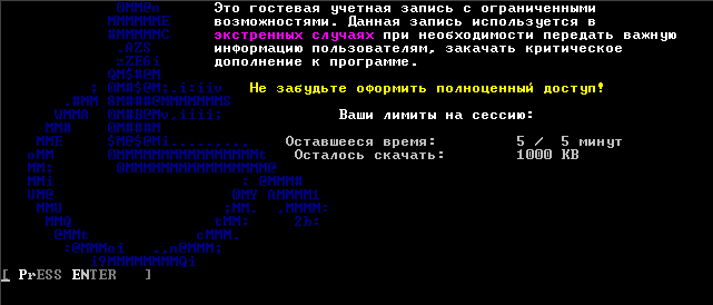 Заставка, выполненная ANSI-графикой, выводимая при подключении пользователя через гостевой аккаунт.